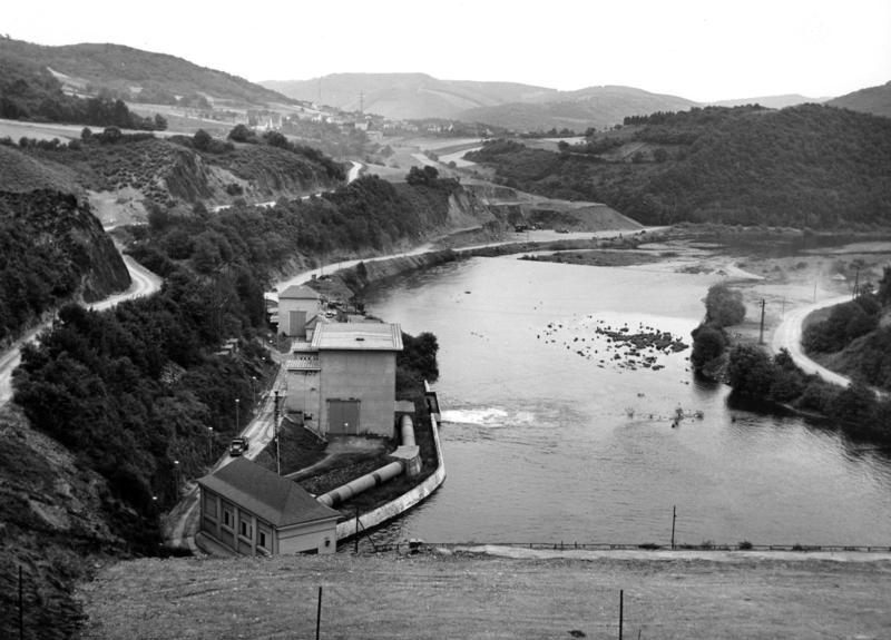 August 1956 Kreis Schleiden/Eifel Talsperre Schwammenauel